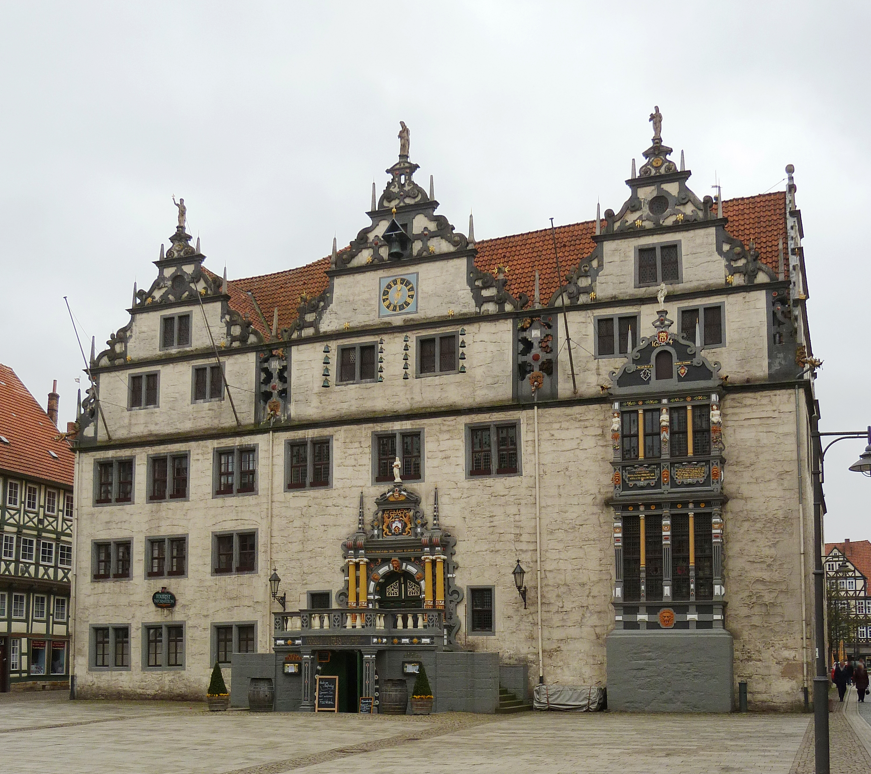 Vorderseite (Nordseite) des Renaissance-Rathauses in Hann. Münden, Südniedersachsen